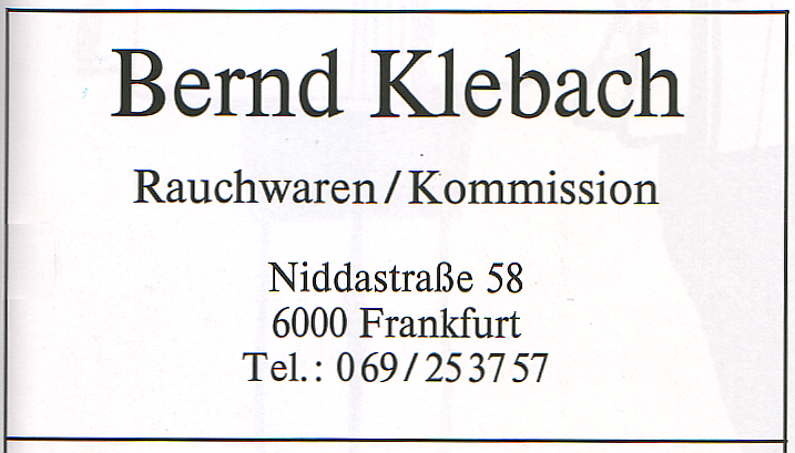 Bernd Klebach, Rauchwaren, Kommission, Niddastraße 58, 6000 Frankfurt. Anzeige in einer Fachzeitschrift. Bernd Klebach († August 2008) verfasste das nur in sehr kleiner Auflage (wohl etwa maximal 60 bis 70 Stück) im Selbstverlag erschienene Buch über das Pelzhandelszentrum in Frankfurt am Main, rund um die Niddastraße: Der Brühl, die Niddastraße, das Pelzzentrum, Erinnerungen an 35 Jahre Rauchwarenbranche (Juni 2006, Ringbindung).